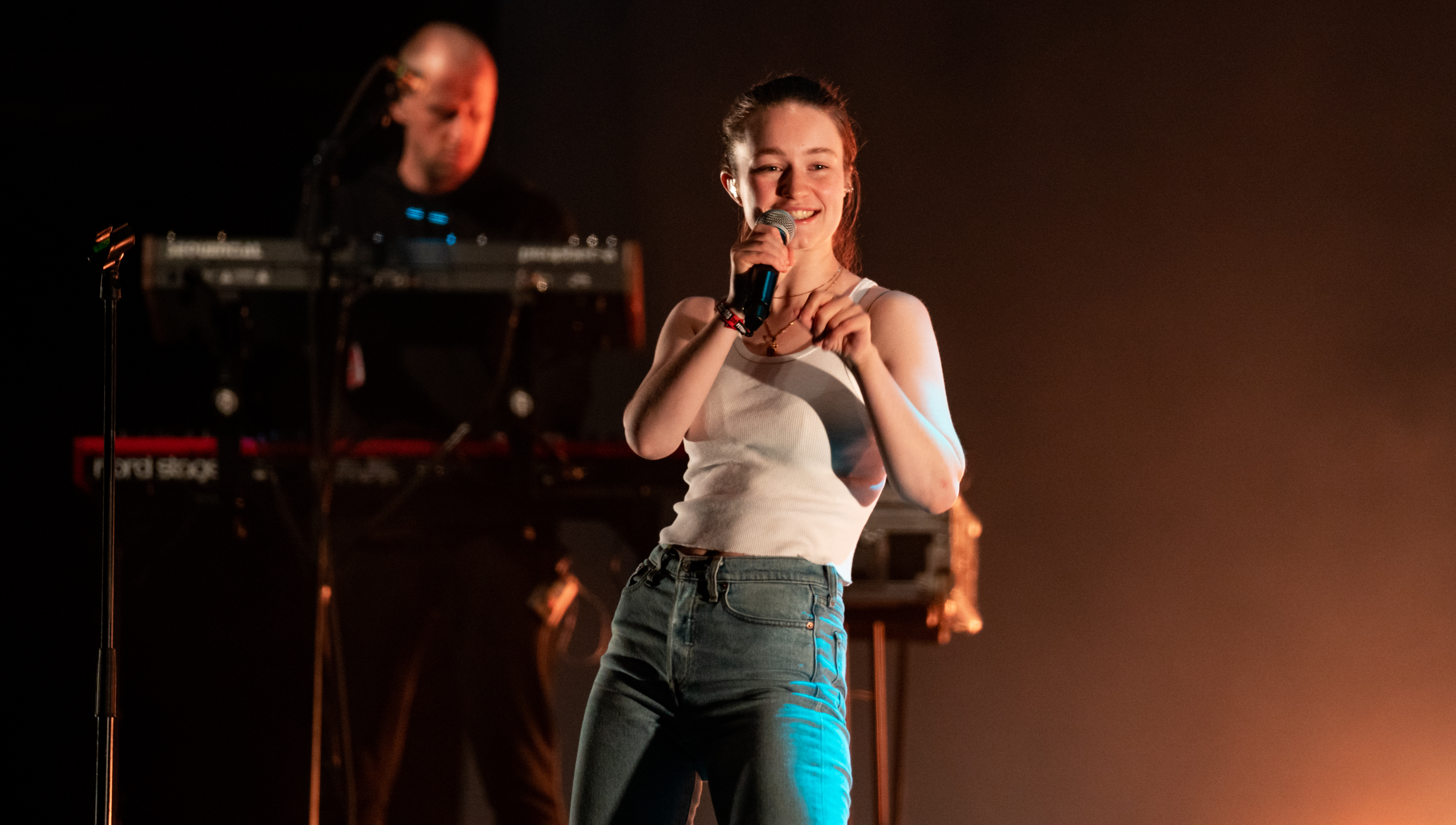 Primavera19_-81